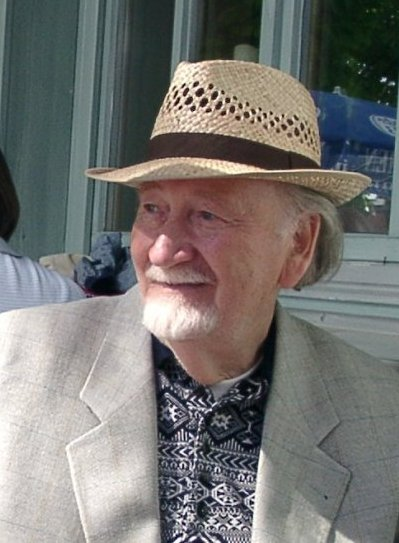 Ľudovít Štrompach v lete v roku 2003 v Nemecku. Obrázok je zo súkromnej rodinnej zbierky, nahraný rodinným prílušníkom so súhlasom na uverejnenie.